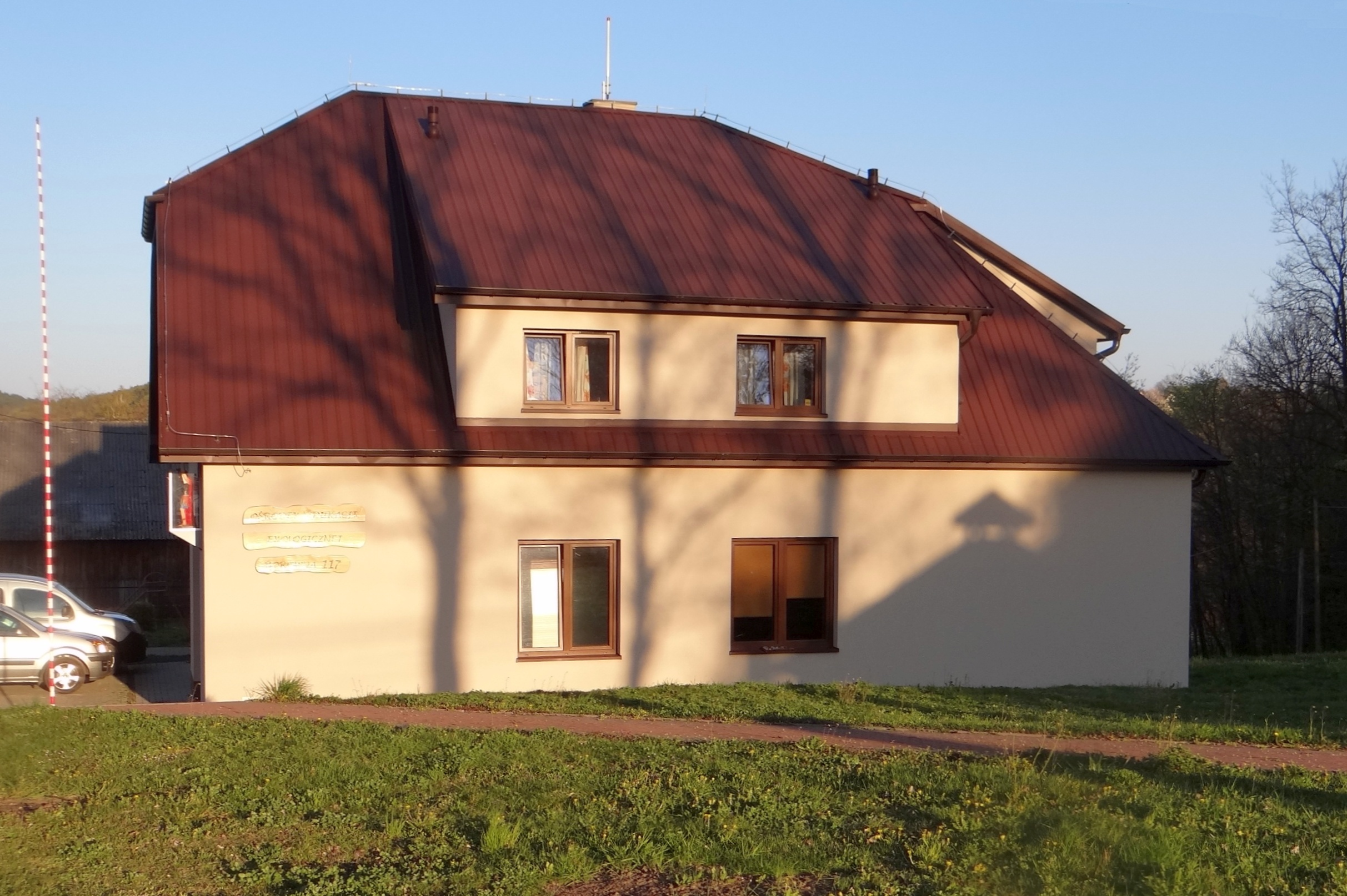 Borówna. Remiza i Centrum edukacji ekologicznej